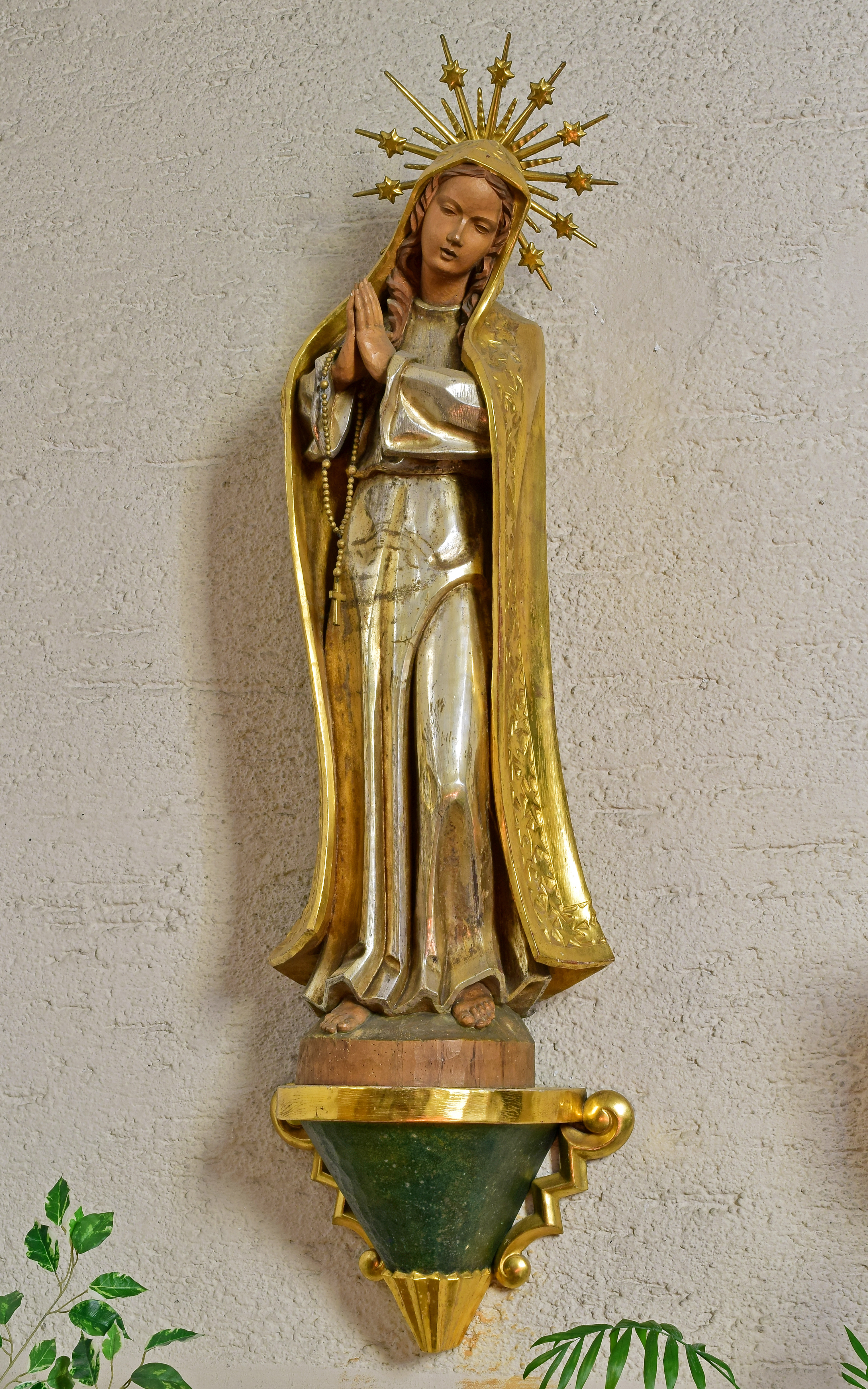 Die neuzeitliche Fatima-Madonna fertigte Klothilde Rauch (Altmünster) im Jahr 1950 an.